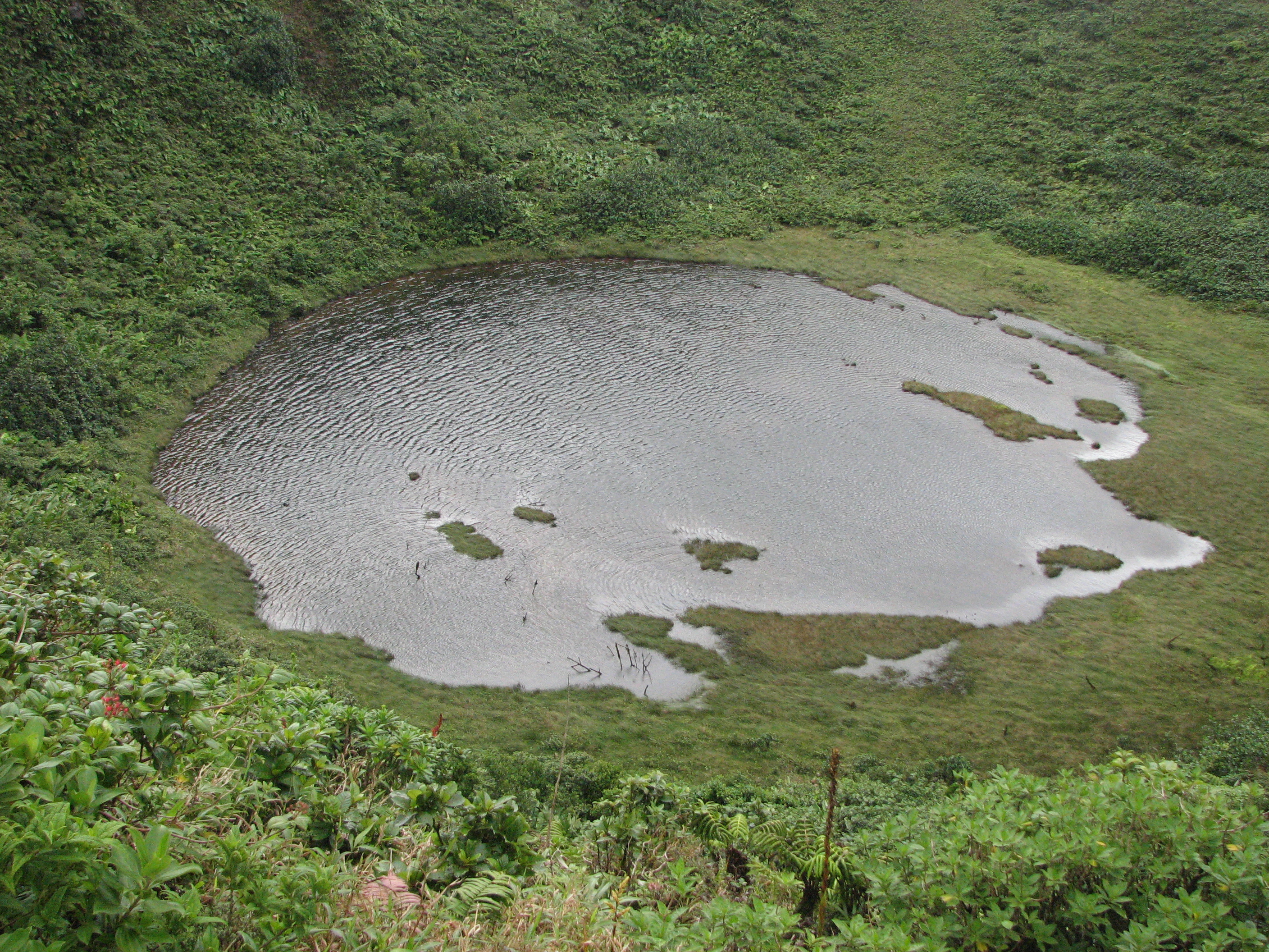 Lac Flammarion, dans le cratère de la Citerne, volcan secondaire de la Soufrière (Guadeloupe)